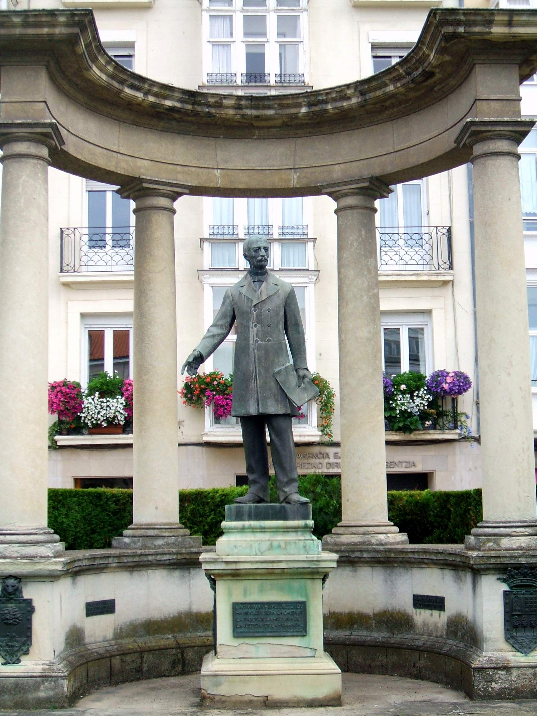 Diputación Foral de Álava, en Vitoria-Gasteiz. Estatua del diputado Mateo Benigno de Moraza, defensor de los fueros vascos